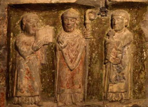 Relleu del sepulcre romànic de Sant Ramon, del s. XII, a la Catedral de Roda d'Isàvena, amb una imatge del sant